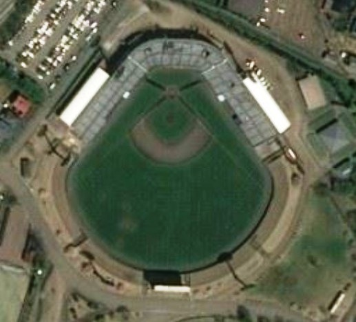 Tsuruoka Stadium